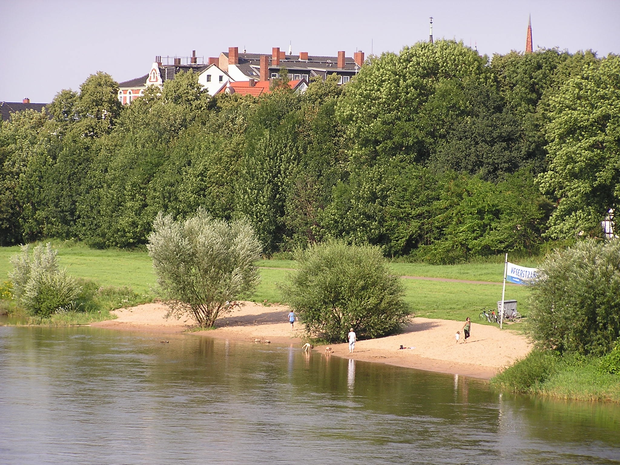 Strand am rechten Weserufer bei Minden, Nordrhein-Westfalen.